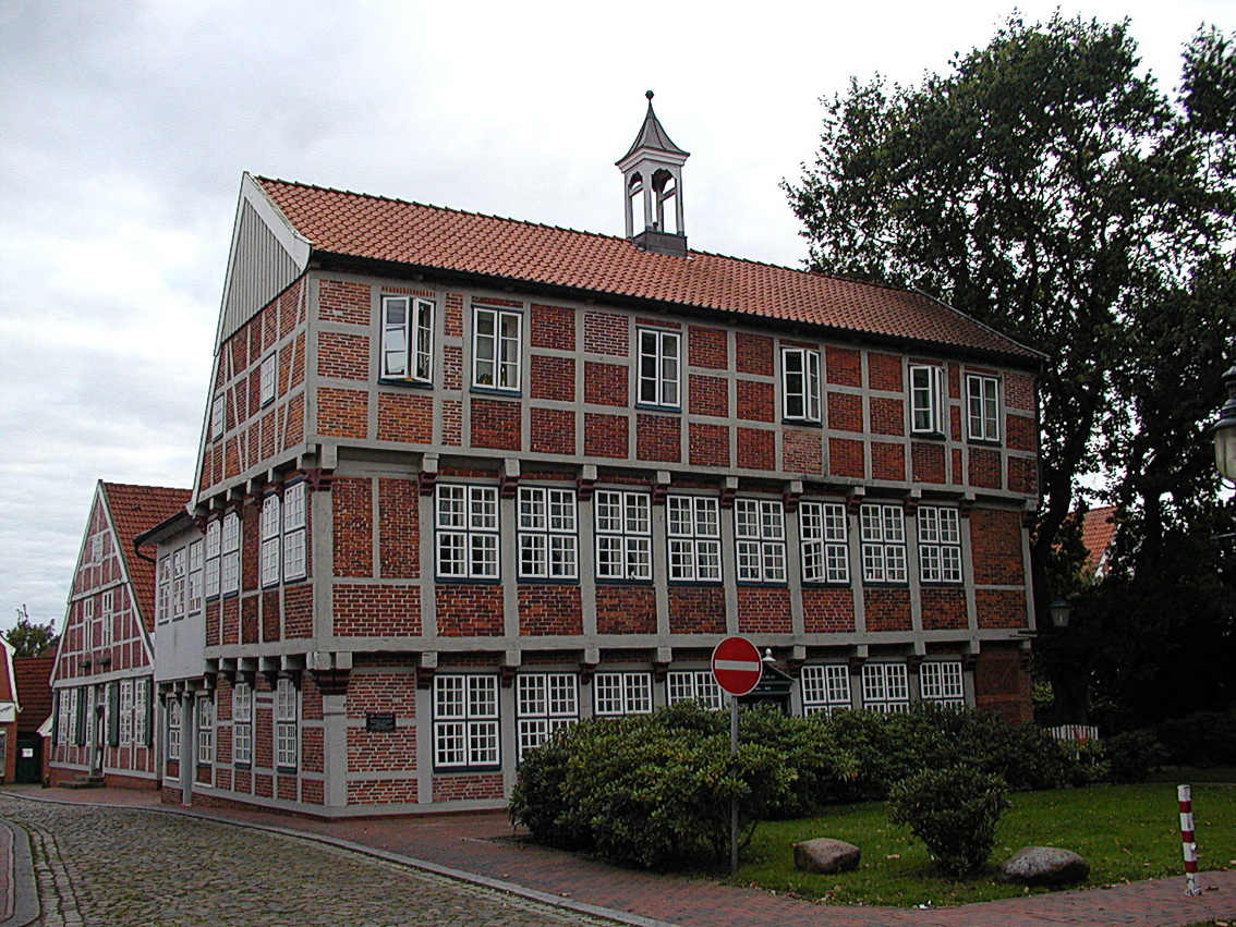 Die Lateinschule